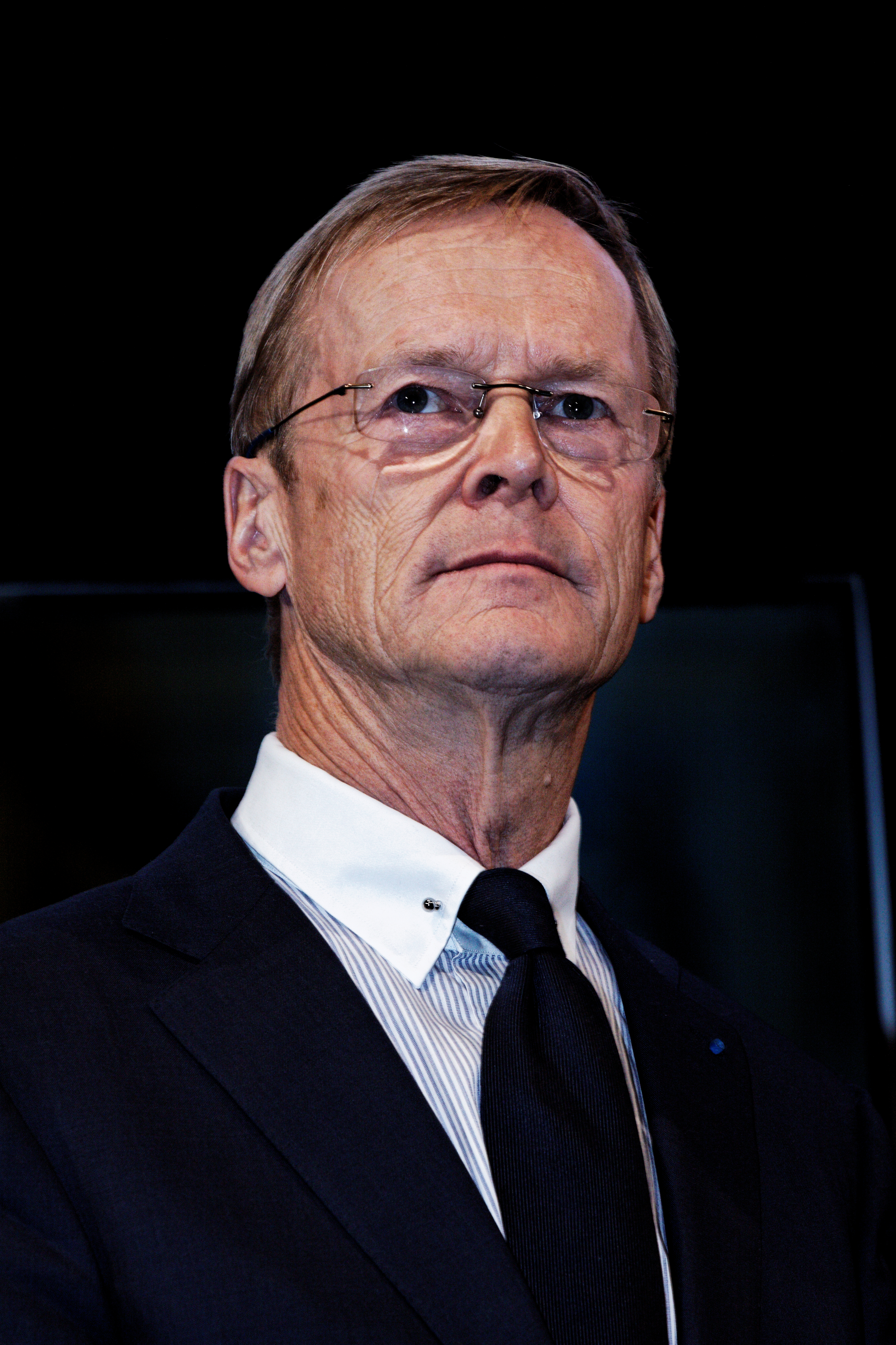 Ari Vatanen lors de la remise des prix du festival automobile 2013.